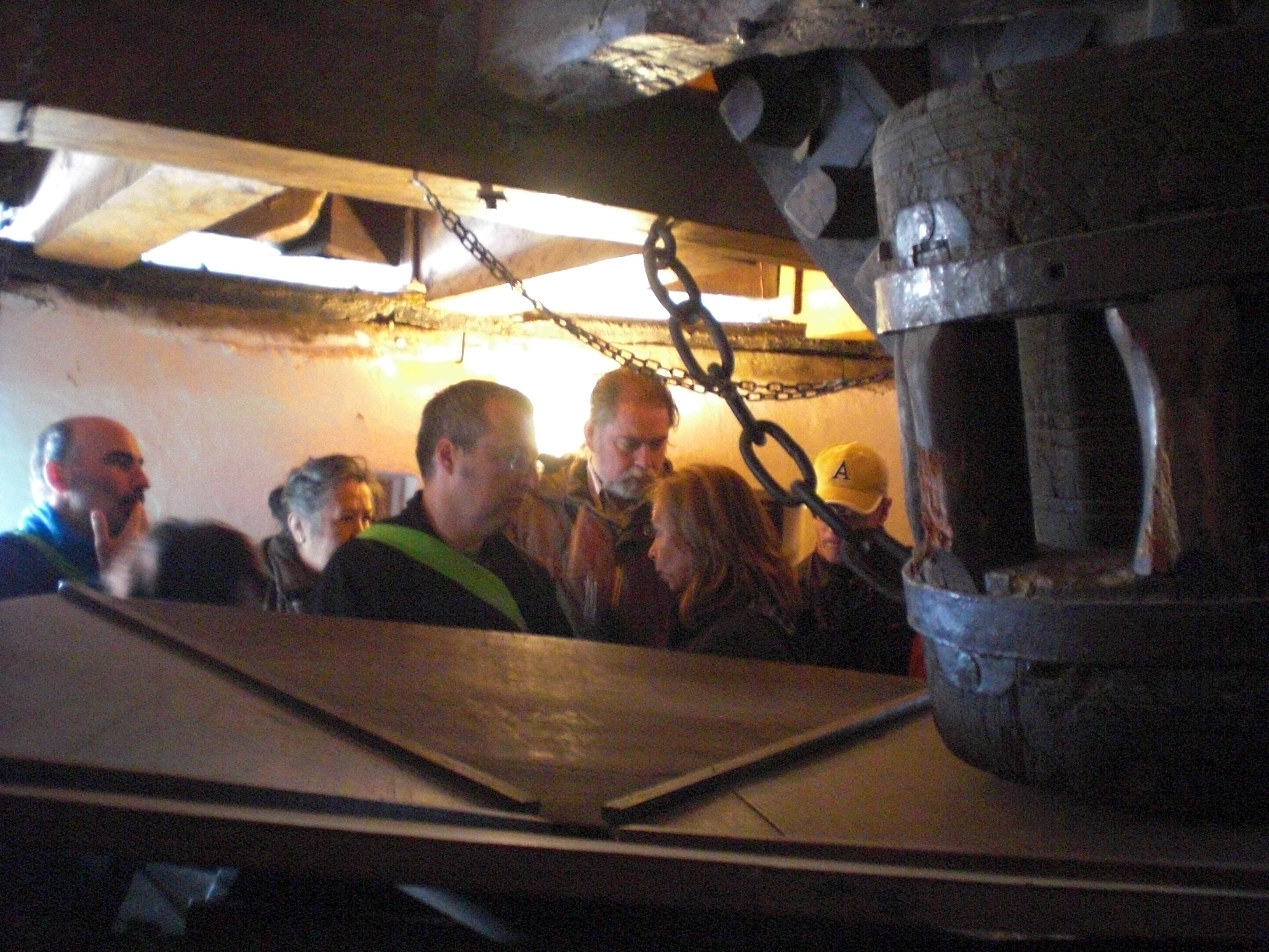 Esperantistoj vizitantaj la internan funkciadon de ventmuelejoj en Campo de Criptana kadre de la 71-a Hispana Kongreso de Esperanto.